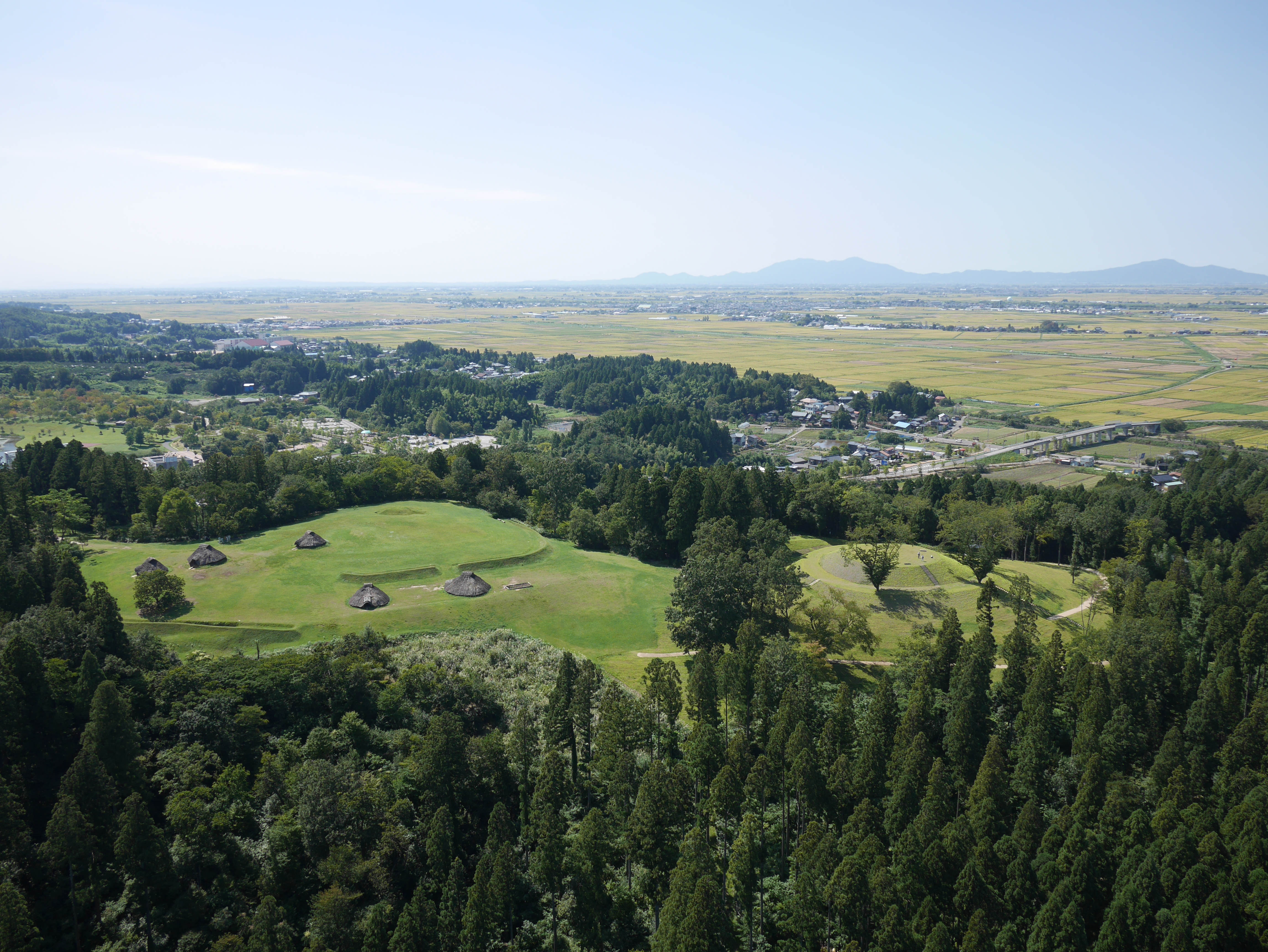 史跡古津八幡山遺跡 歴史の広場 新潟市秋葉区 2015年9月15日撮影